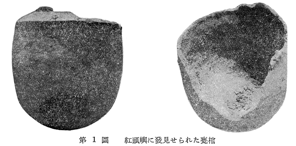 紅頭嶼(蘭嶼)發現之甕棺，屬Lobusbussan文化